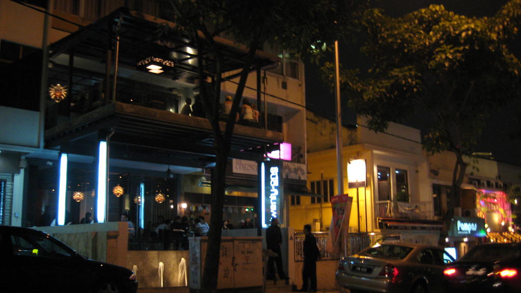 Night in Changkat Bukit Bintang